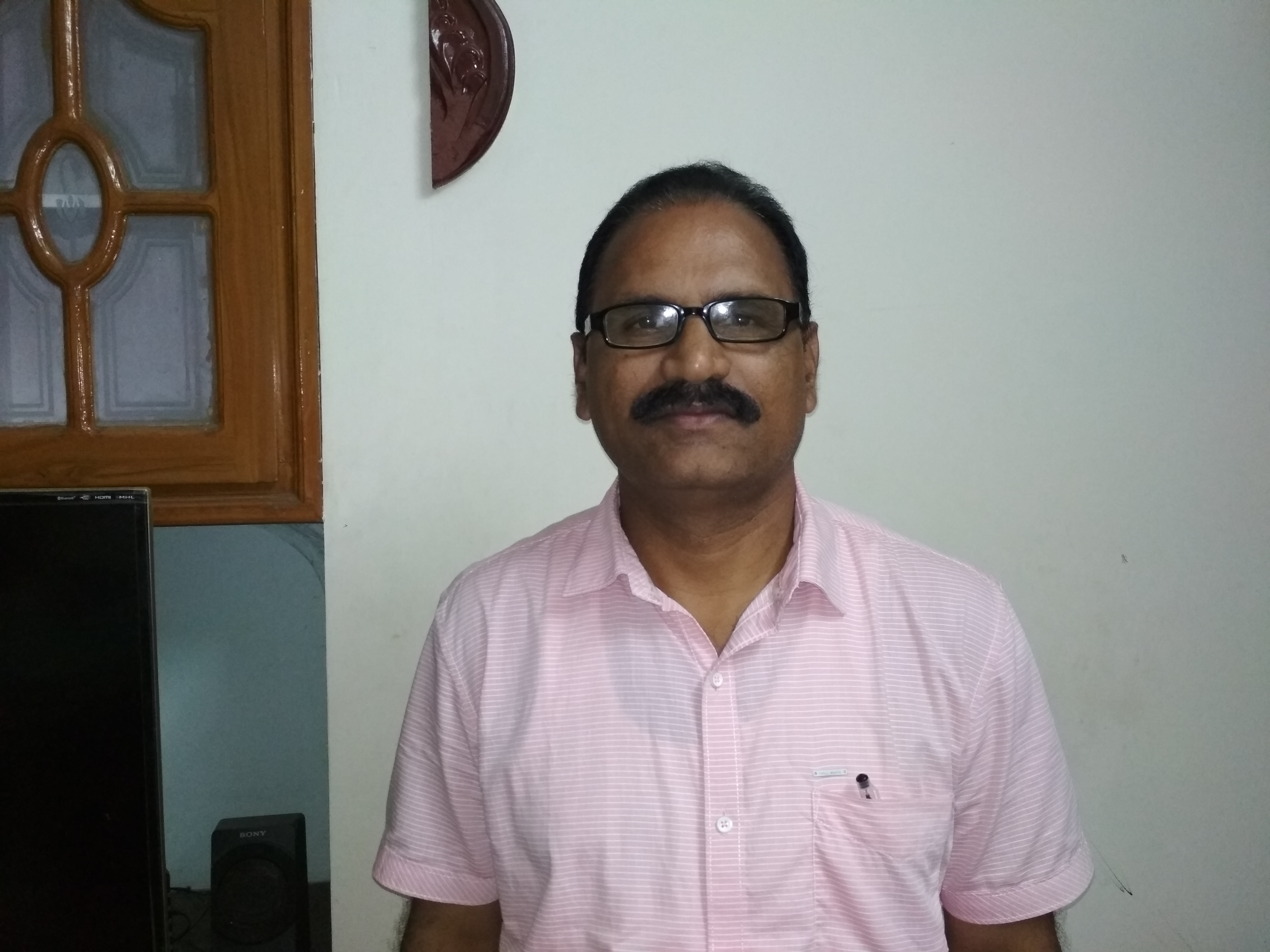 GS Chalam, Telugu writer